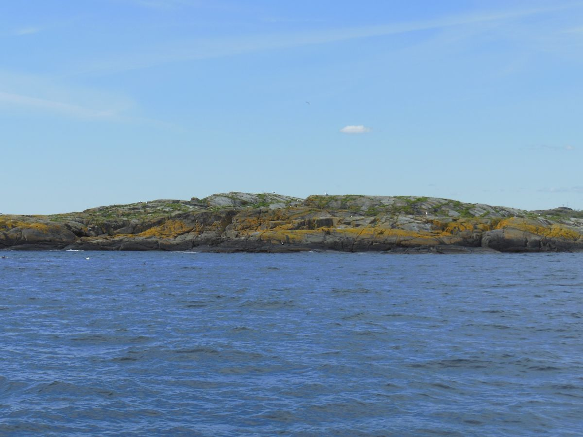 Gul messinglav er typisk for skjær og øyer der sjøfugler holder til. Fuglenes avføring inneholder mye nitrogen. Det gir næring til denne lavtypen.